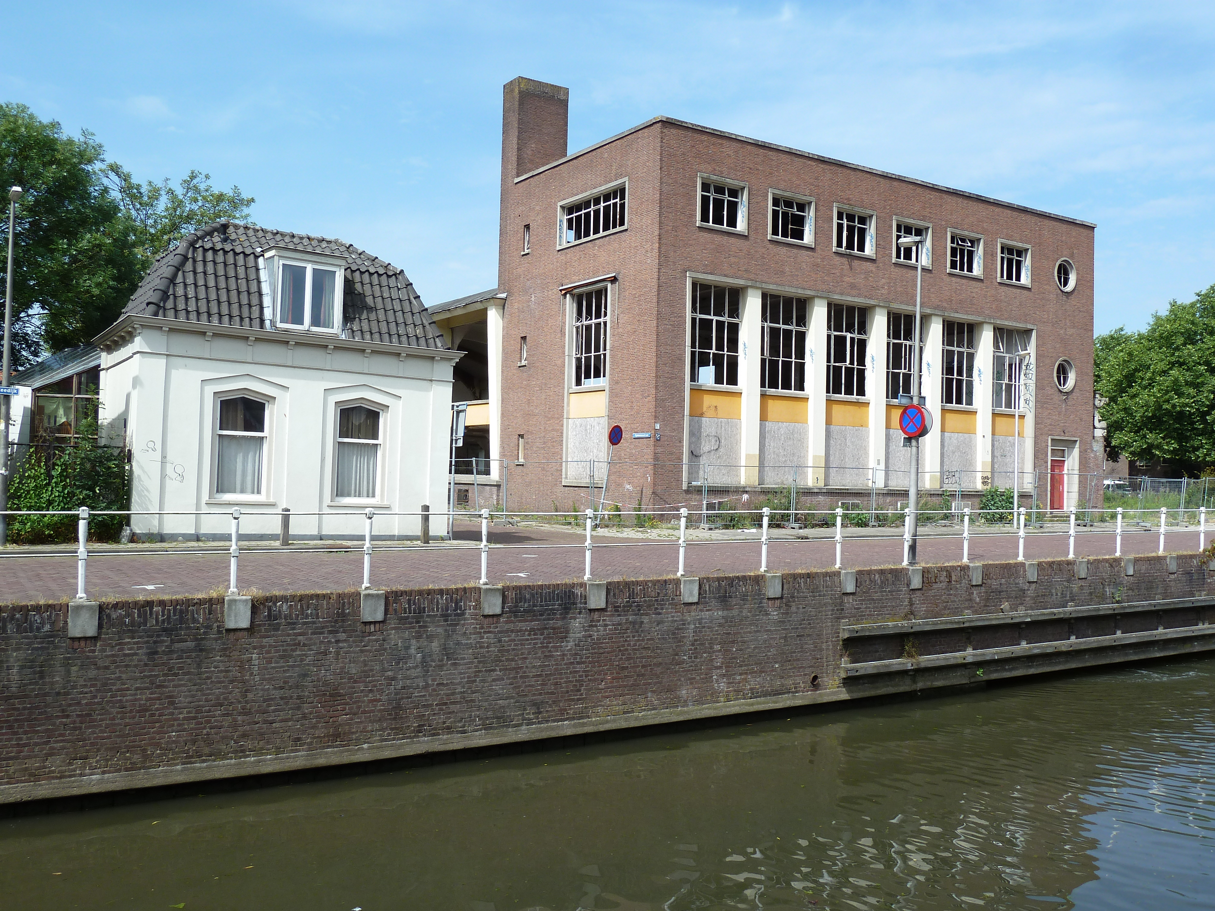 Zijdebalen in Utrecht, NL in 2011 gezien vanaf de Brugstraat. Links het tuindershuisje (gemeentelijk monument) en rechts de voormalige Lubrofabriek, dichtgeplankt en omhekt. Rechts onderin is de uitstroom van de Wester- en Noorderstroom in de Vecht zichtbaar.